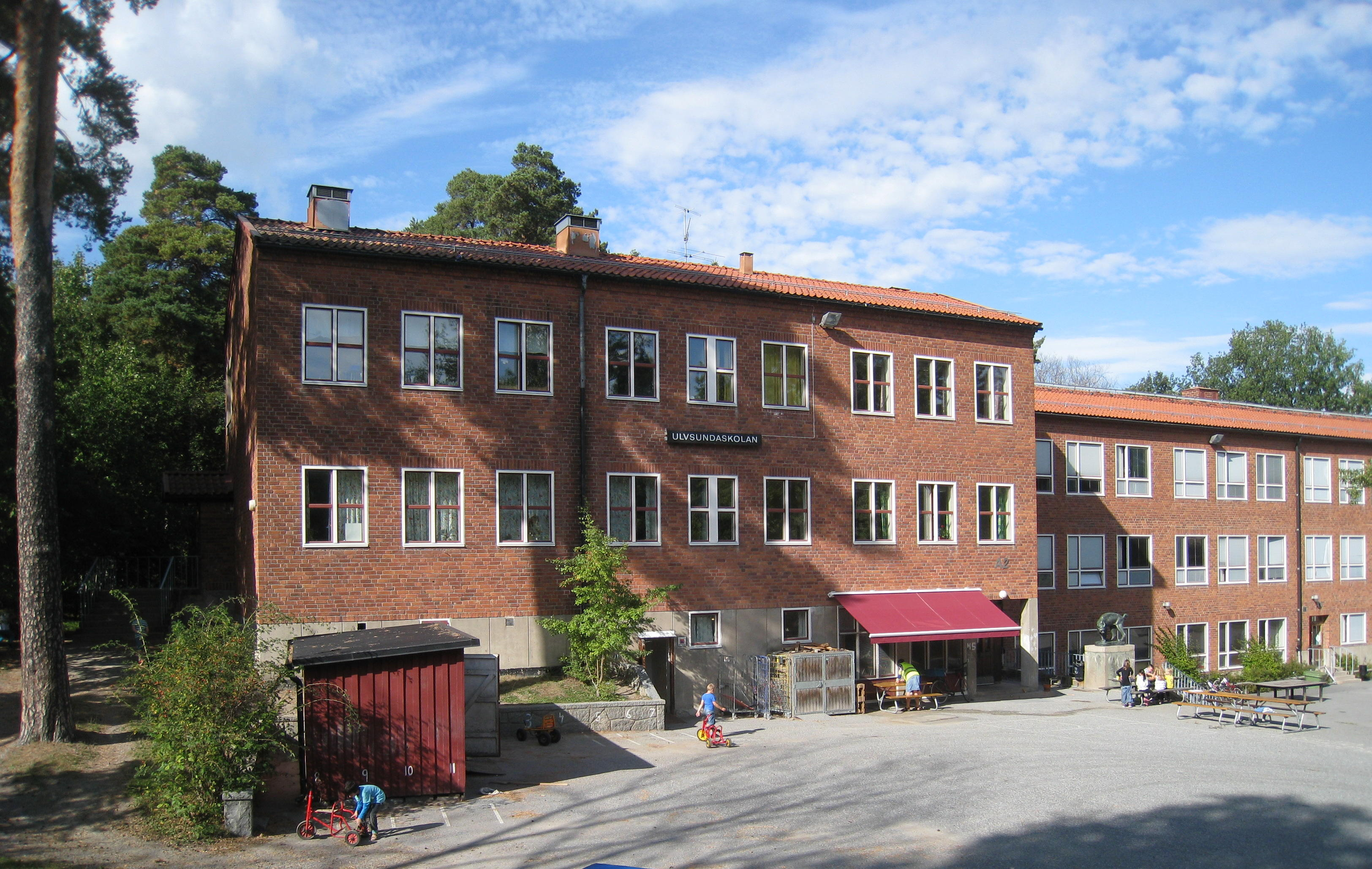 Ulvsundaskolan, Johannesfredsvägen 45 i Ulvsunda i Bromma. Arkitekt var Björn Hedvall och skolan byggdes 1948.